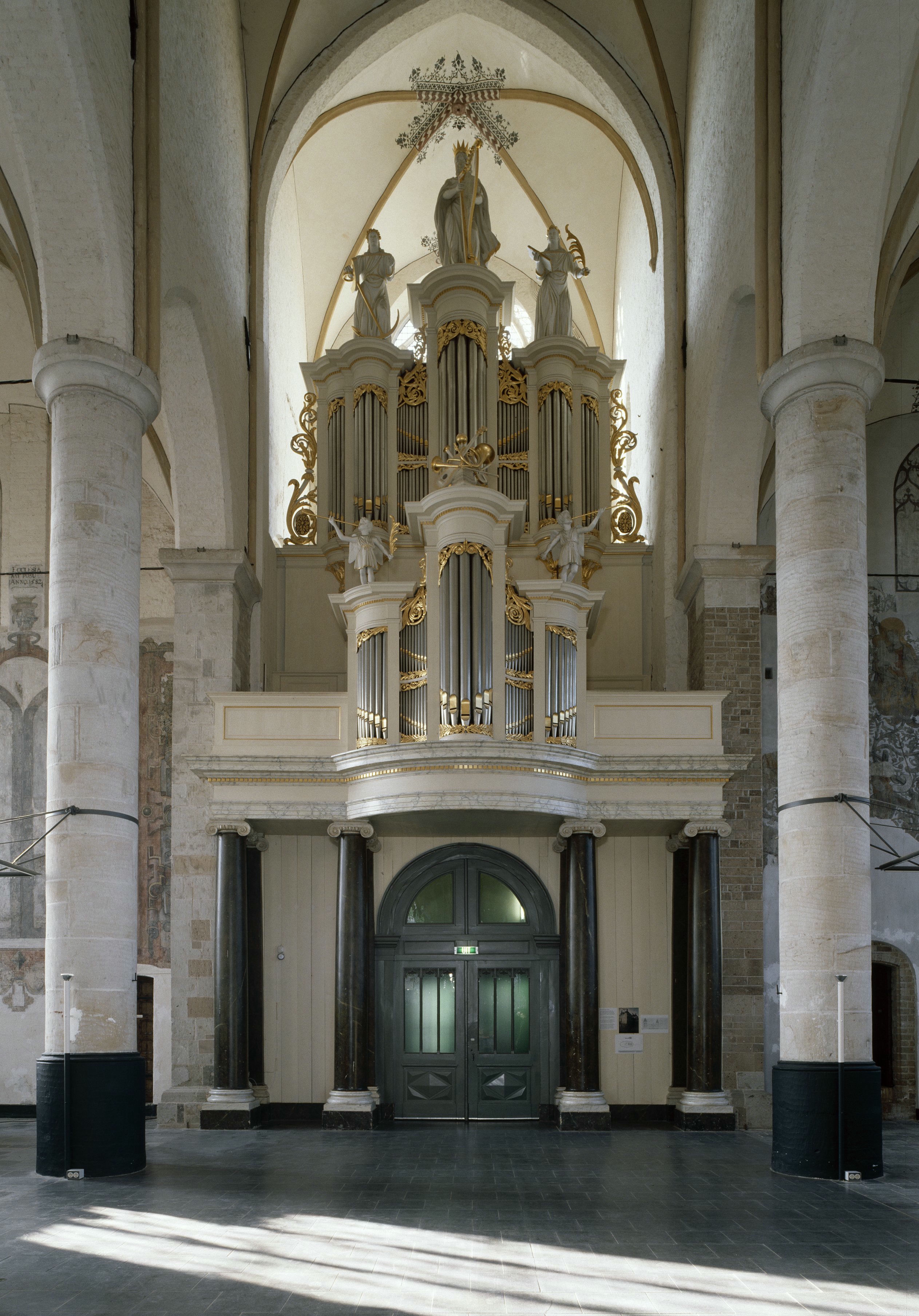 Bergkerk: Interieur, aanzicht orgel, orgelnummer 333 (opmerking: Gefotografeerd voor Het Historische Orgel in Nederland 1840-1849, bladzijde 152)